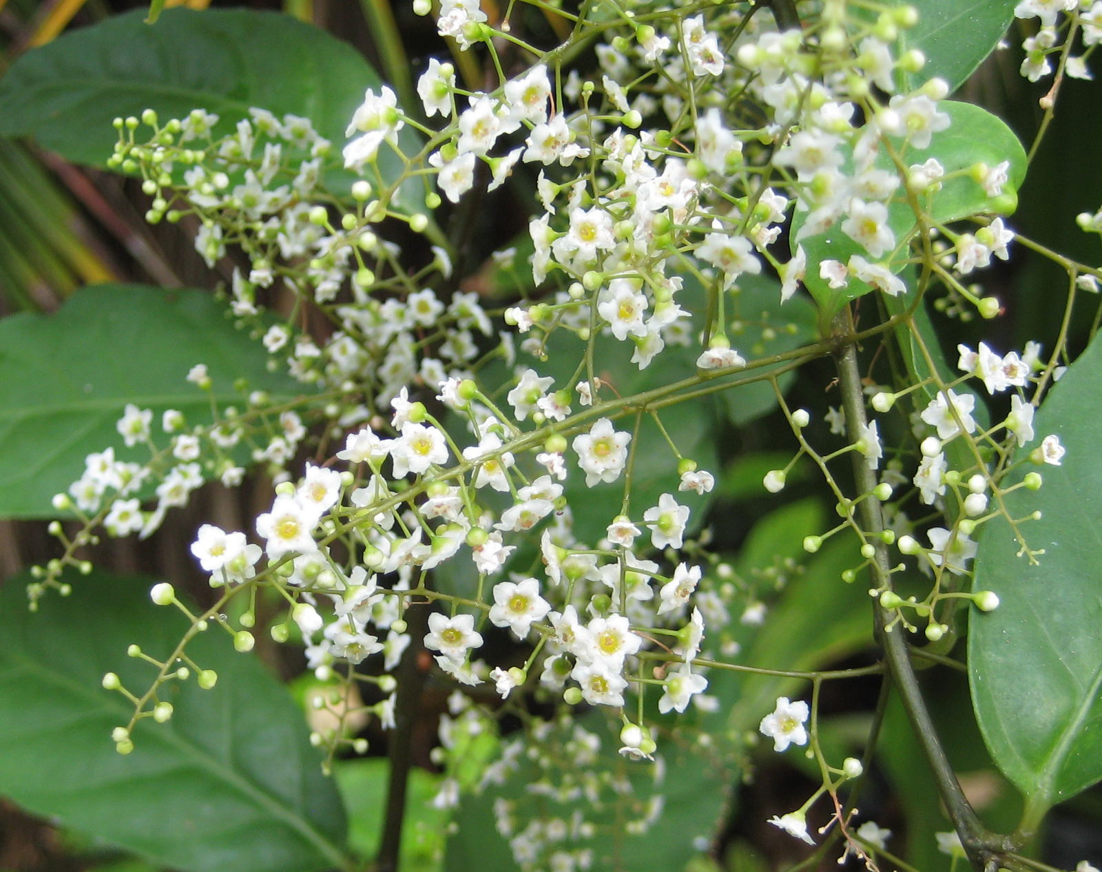 Meliosma henryi im Botanischen Garten Dresden